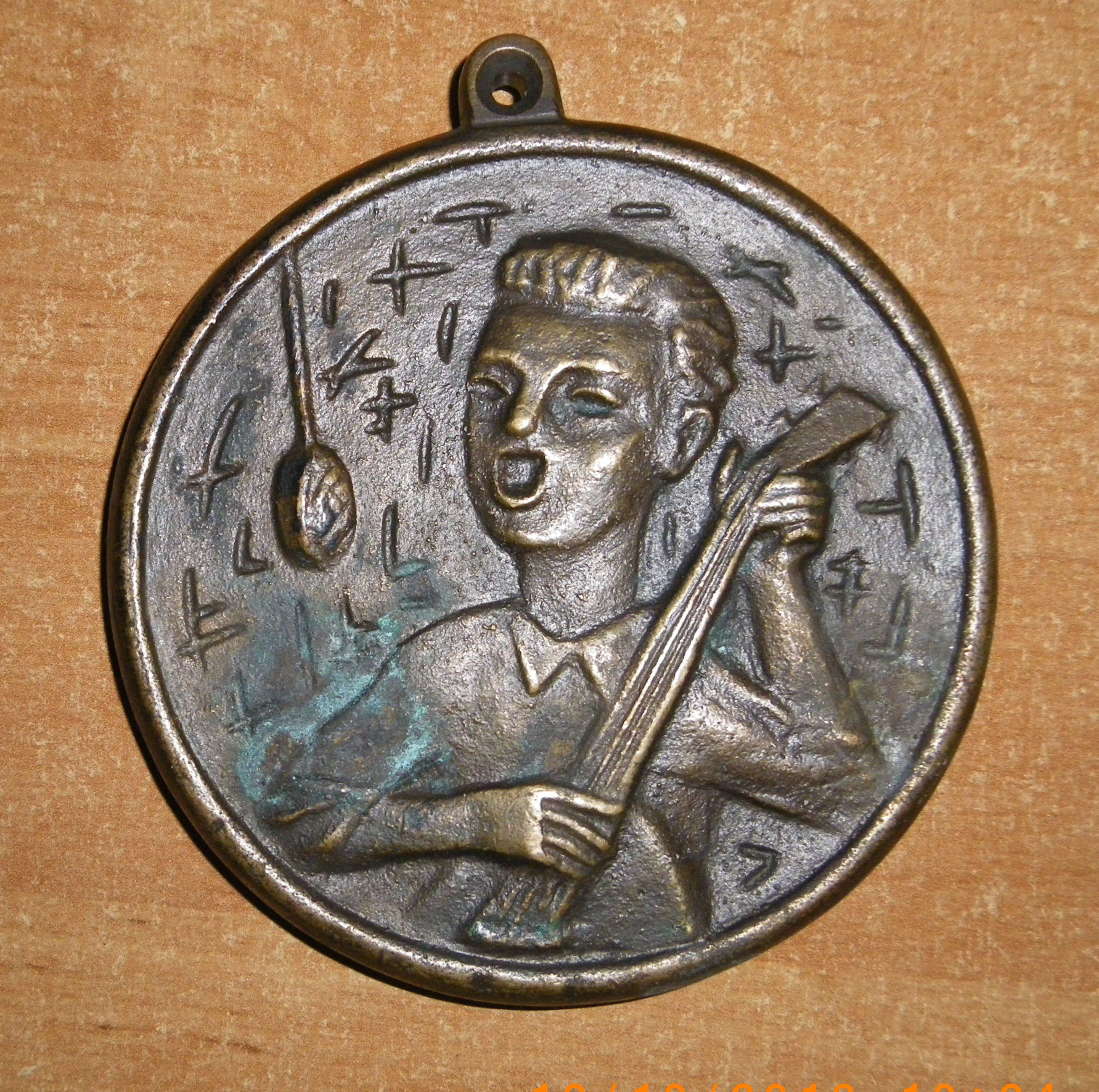 Zdjęcie medalu wręczanego wszystkim uczestnikom Przeglądu Piosenki Studenckiej w Częstochowie w 1962 r.